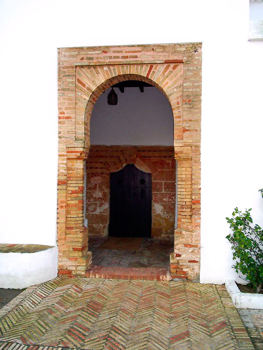 Puerta del Monasterio de La Rábida en Palos de la Frontera. Huelva